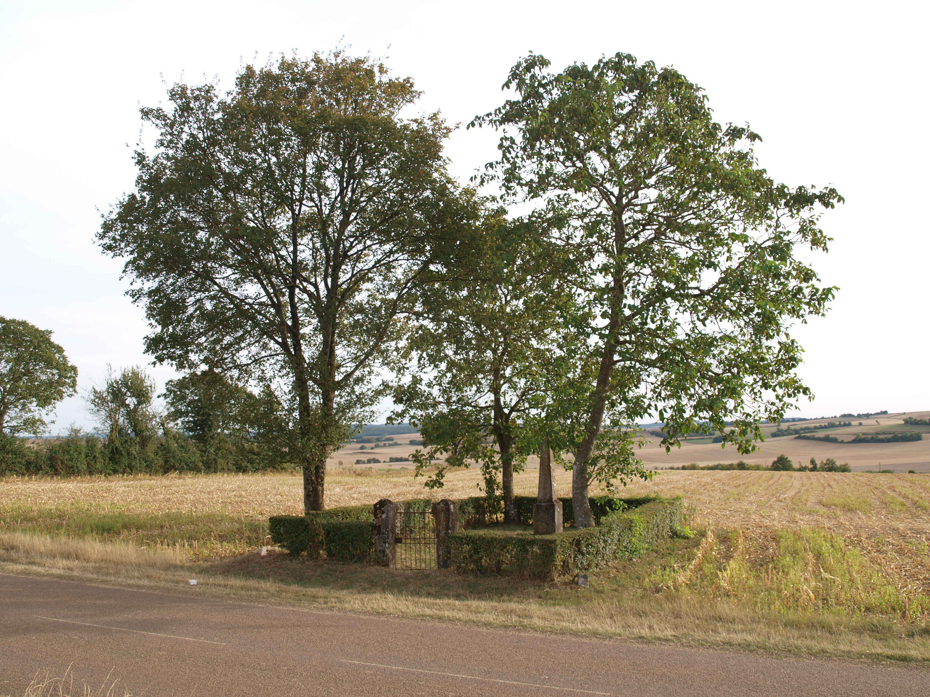 Saints-en-Puisaye (Yonne, France) ; tombe de Alfred Saison, au hameau de Le Buisson-Héry.